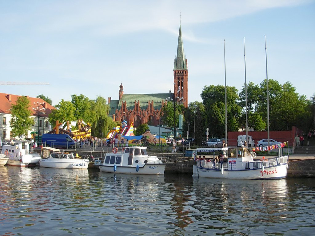 Impreza "Ster na Bydgoszcz" na Placu Solnym